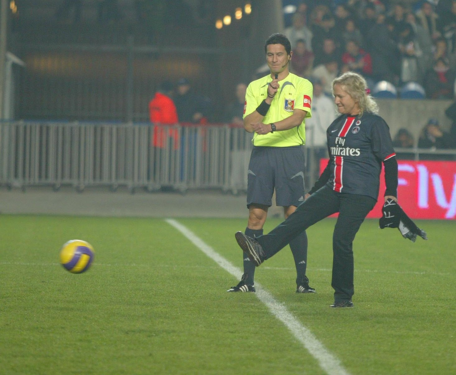 Agnès b.